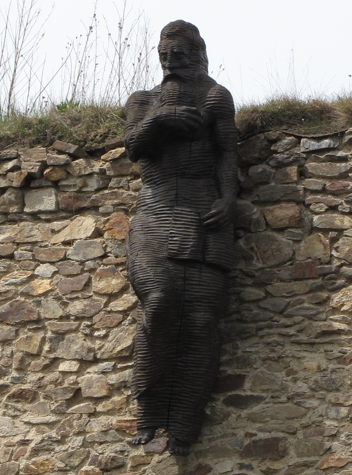 Pelhřimov. Okres Pelhřimov, Česká republika.